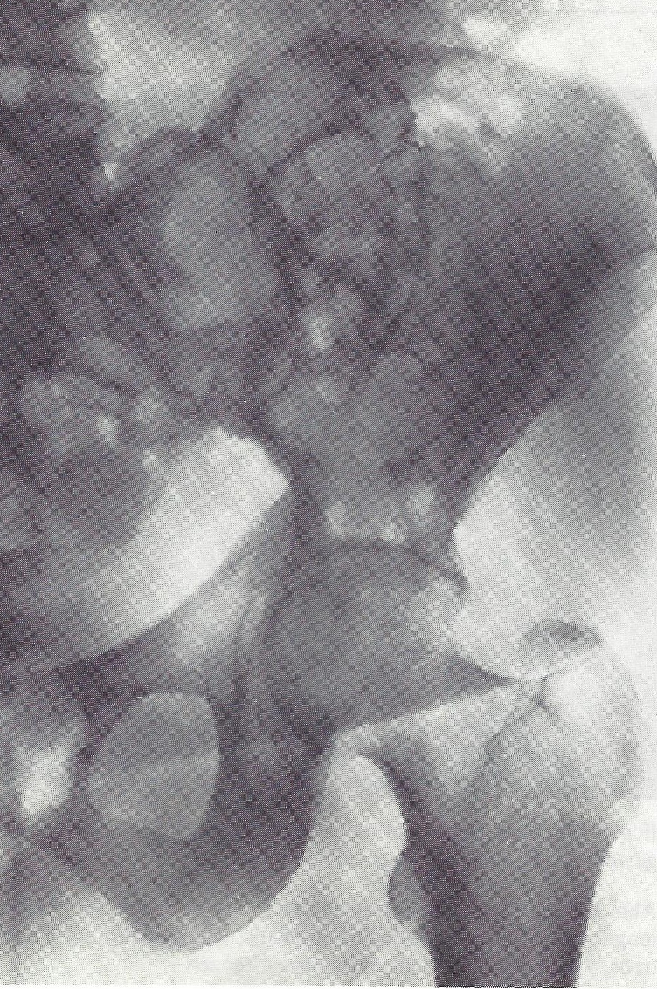 Röntgenaufnahme der linken Beckenhälfte bei einer 57-jährigen Patientin: Wabiger expansiver Knochentumor im Os sacrum und im Os ileum. In der Computertomografie sekundäre Infiltration der Weichteile. Pathologisch-anatomische Diagnose: Aggressive Fibromatose.